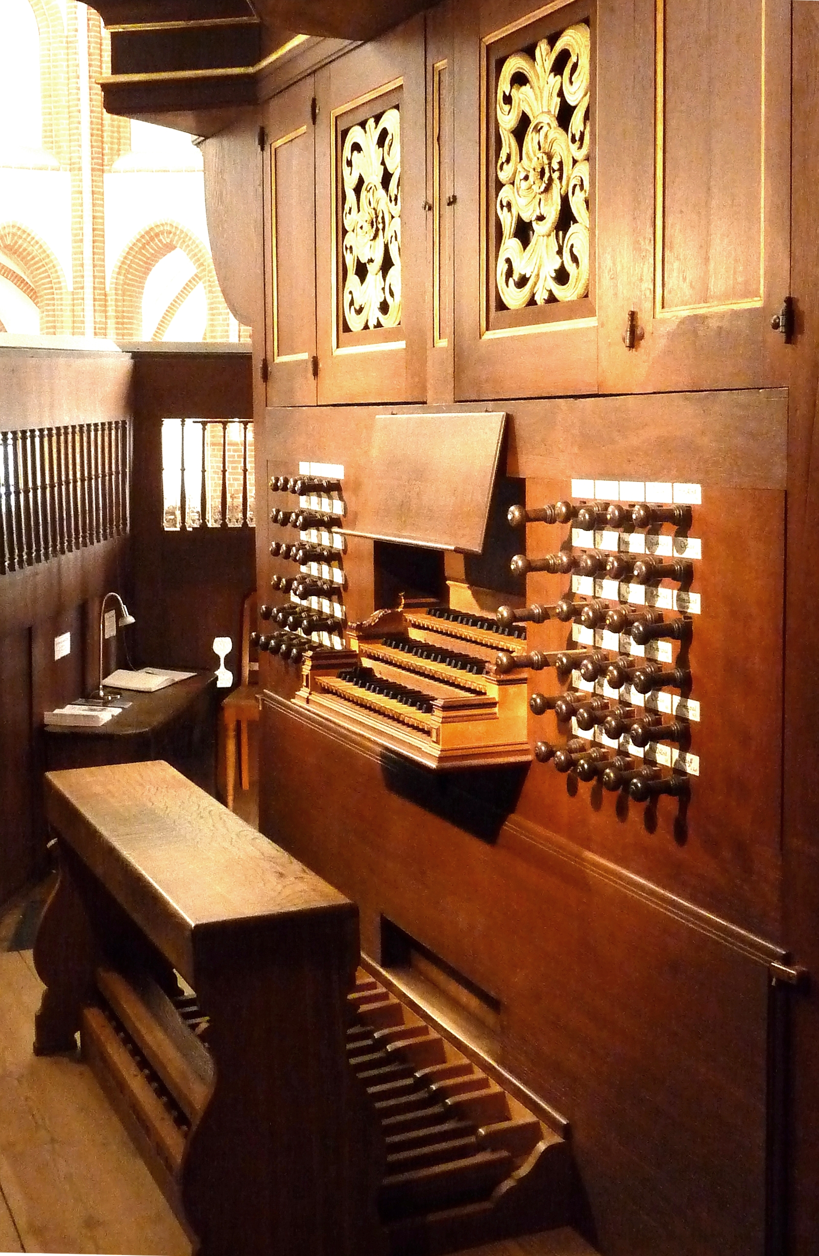 Spieltisch der Norder Arp-Schnitger-Orgel